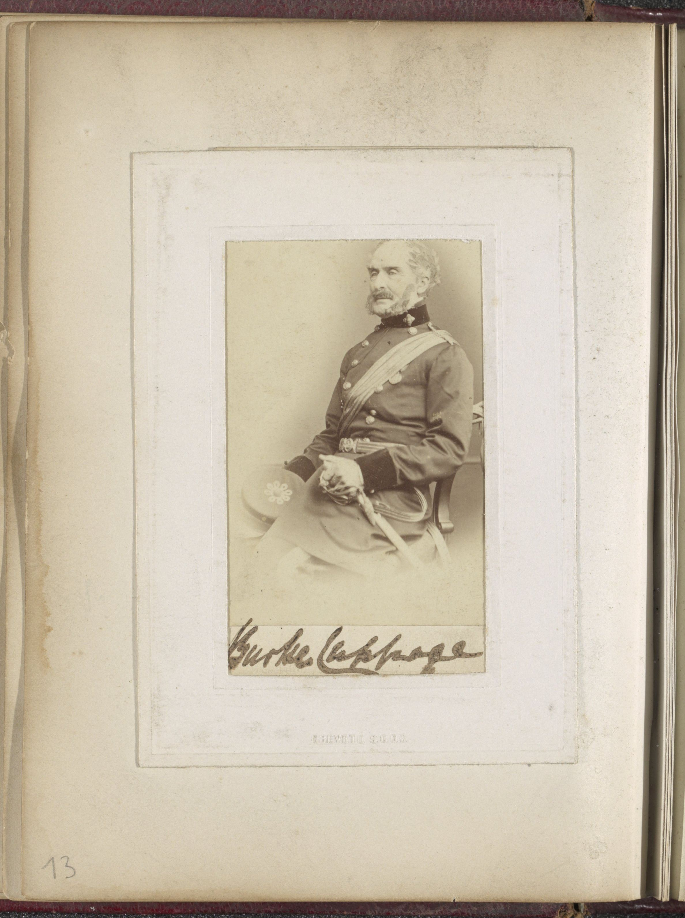 IdentificatieTitel(s): Portret van sir Burke Douglas Cuppage. Burke Cuppage (titel op object)Objecttype: foto carte-de-visite Objectnummer: RP-F-1999-158-13Opschriften / Merken: adres, verso: ‘Jersey’Omschrijving: Onderdeel van Fotoalbum met 48 cartes-de-visite aangeboden aan maarschalk graaf De Castellane.VervaardigingVervaardiger: fotograaf: Henry MullinsPlaats vervaardiging: JerseyDatering: ca. 1860 - ca. 1865Fysieke kenmerken: albuminedrukMateriaal: karton papier fotopapier Techniek: albuminedrukAfmetingen: foto: h 89 mm × b 53 mmkarton: h 107 mm × b 57 mmOnderwerpWat: historical persons(military) uniformshacking and thrusting weapons (with NAME)head-gear: capsideburnshairdressveteranWaar: JerseyWie: Burke Douglas Cuppage (Sir)Verwerving en rechtenVerwerving: aankoop 1999Copyright: Publiek domein